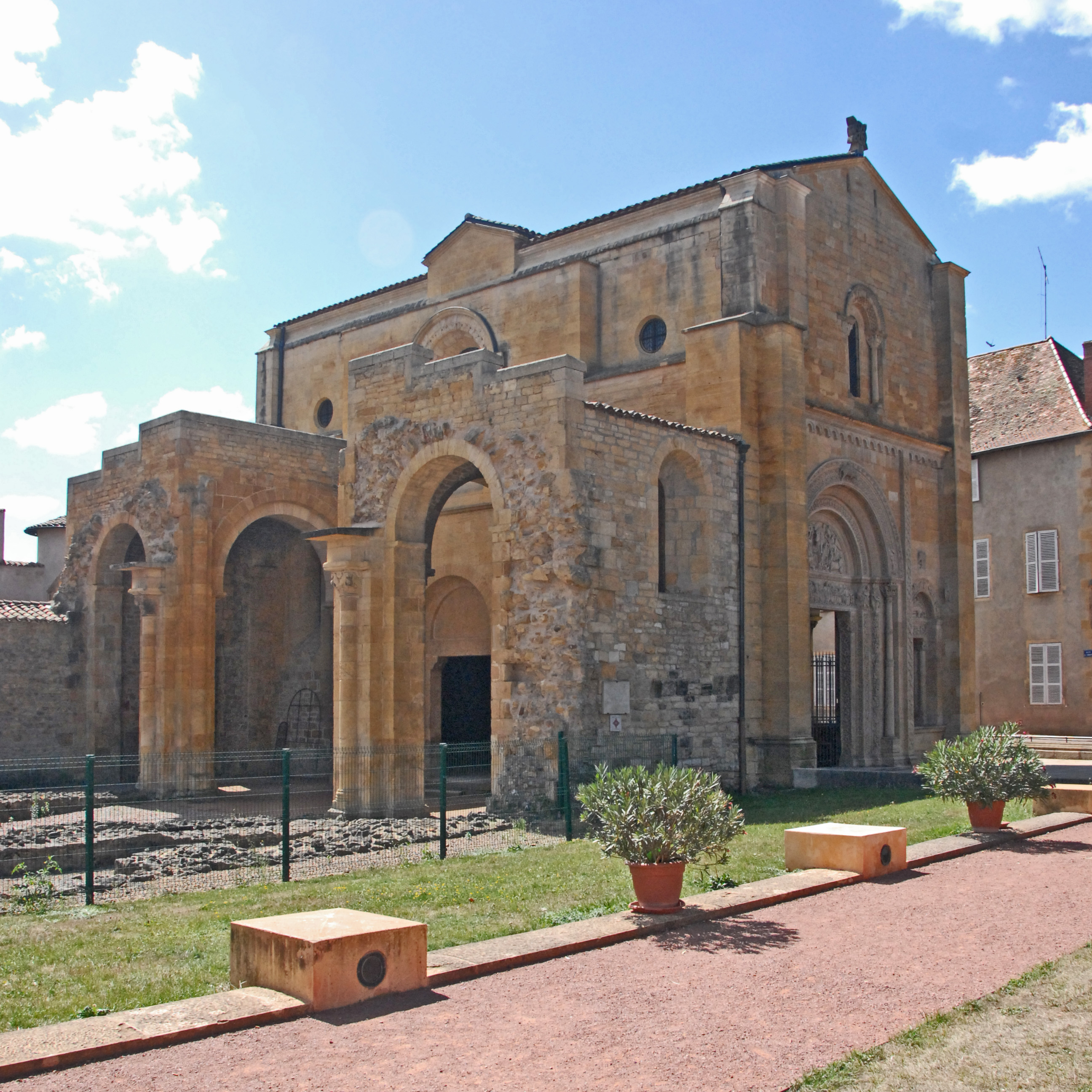 St-Fortunat, Charlieu, Narthex von NO